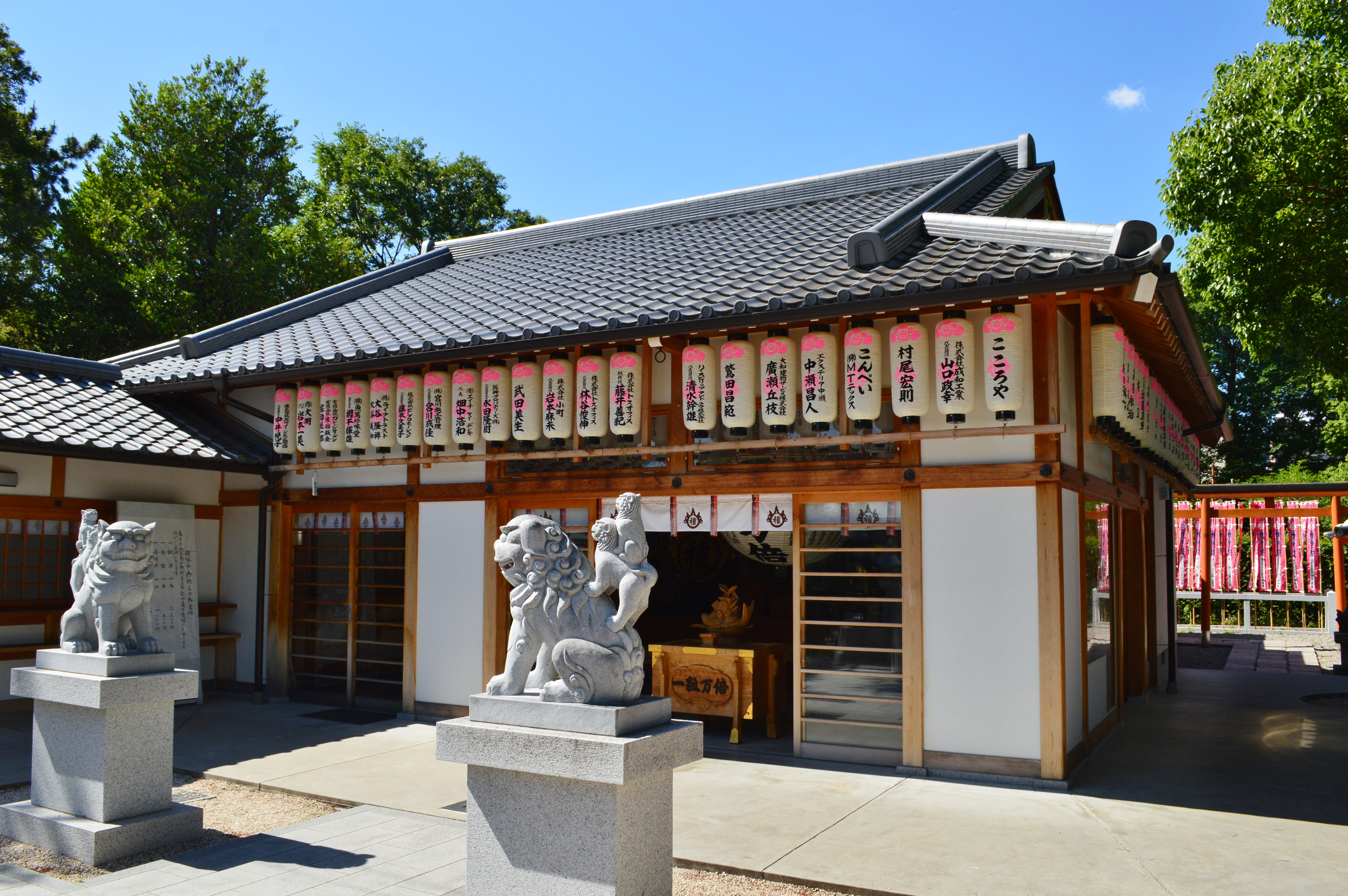 住吉大社境内末社 種貸社